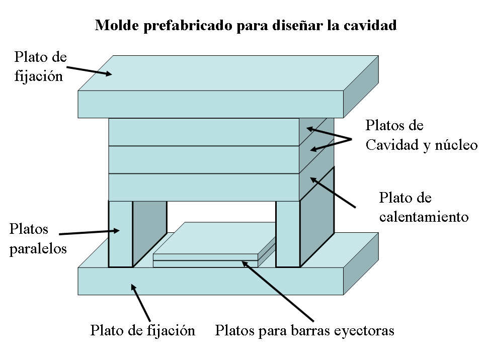 Esquema de un molde típico prefabricado comercial para fabricación de cavidad